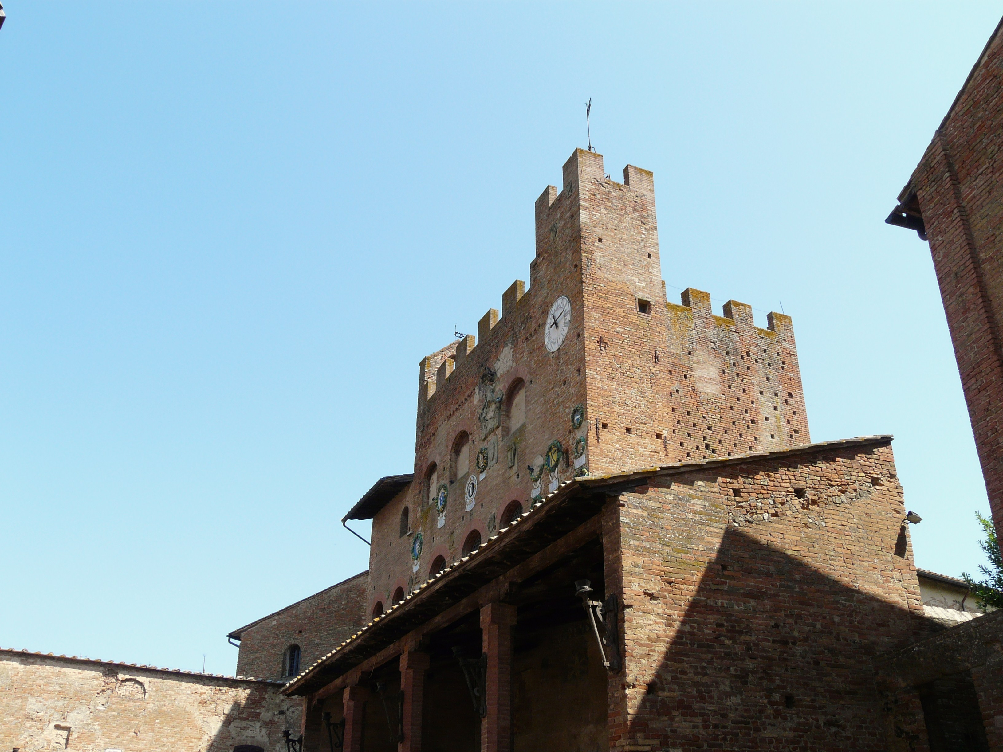 Palazzo Pretorio, Certaldo Alto, Certaldo, Toscana, Italia